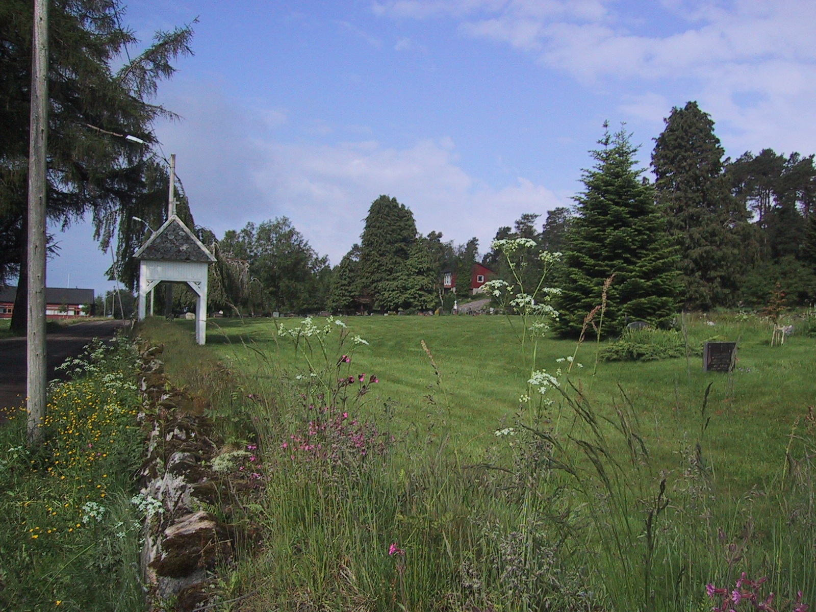 Bolsøy gamle kirkested på Bolsøya. Foto: Dag Bertelsen, fra Lokalhistoriewiki.